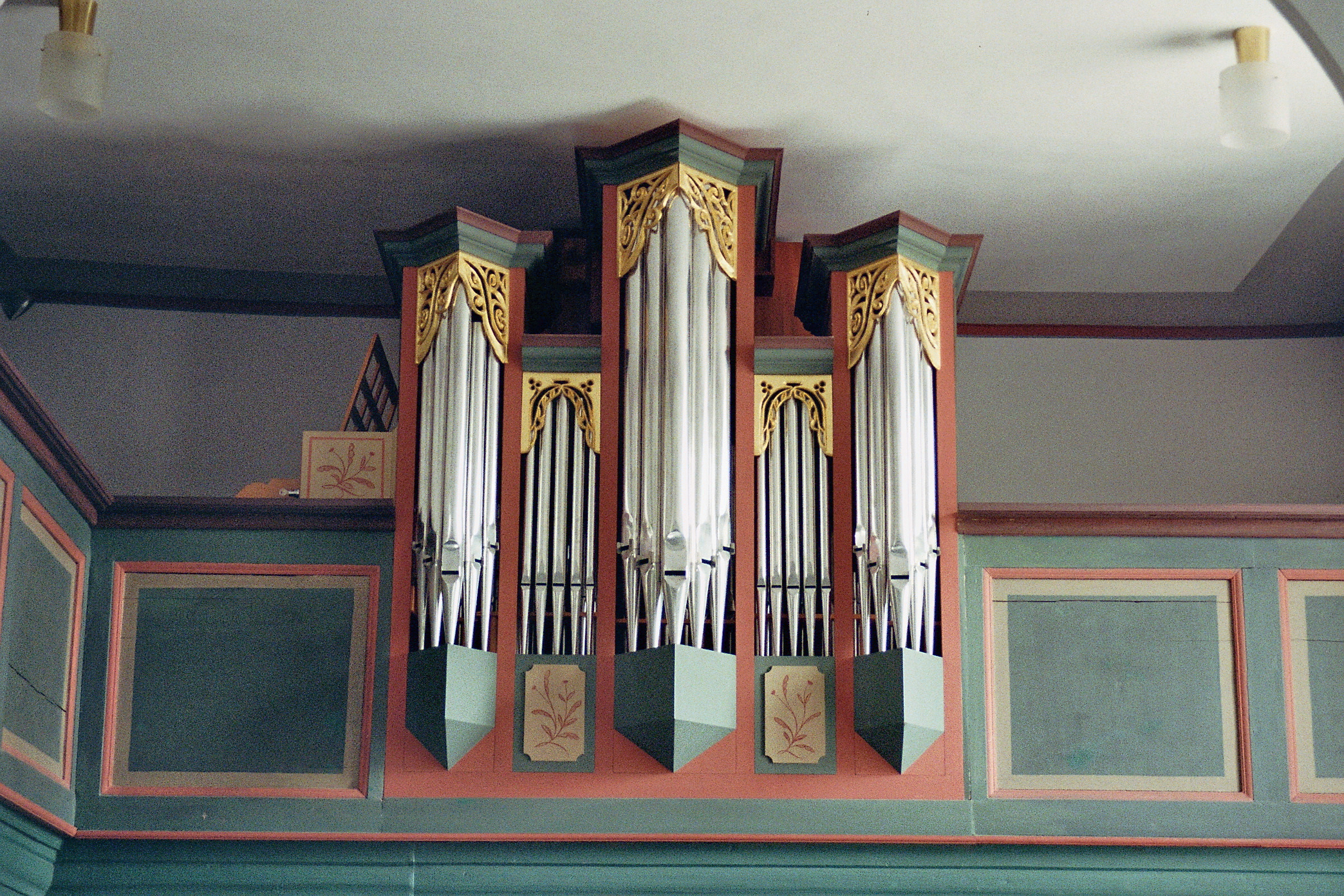 Orgel der Evangelischen Kirche Bersrod, Gemeinde Reiskirchen, Landkreis Gießen, Hessen, Deutschland